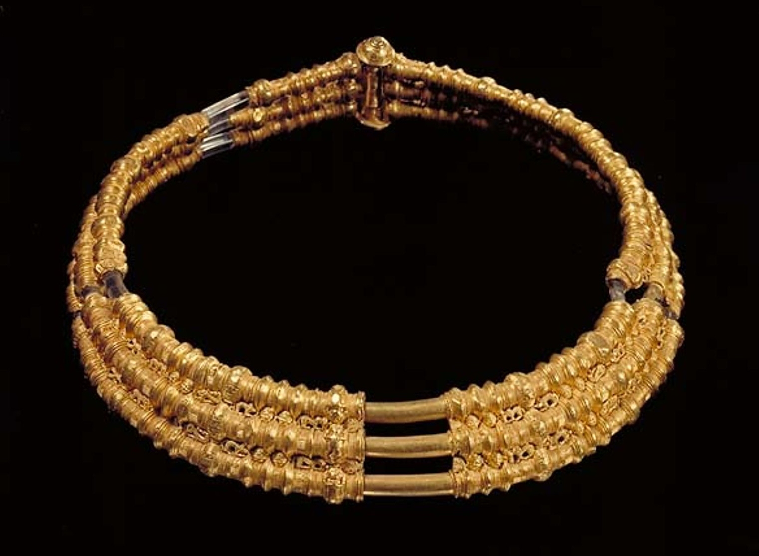 Ållebergskragen. Statens historiska museum, inventarienummer 492.